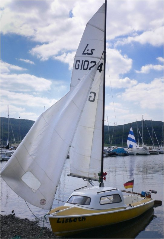 Segelboot, Lis-Jollenkreuzer, Lis-G1024, "Lisbeth", Baujahr 1978, Edersee-Halbinsel Scheid